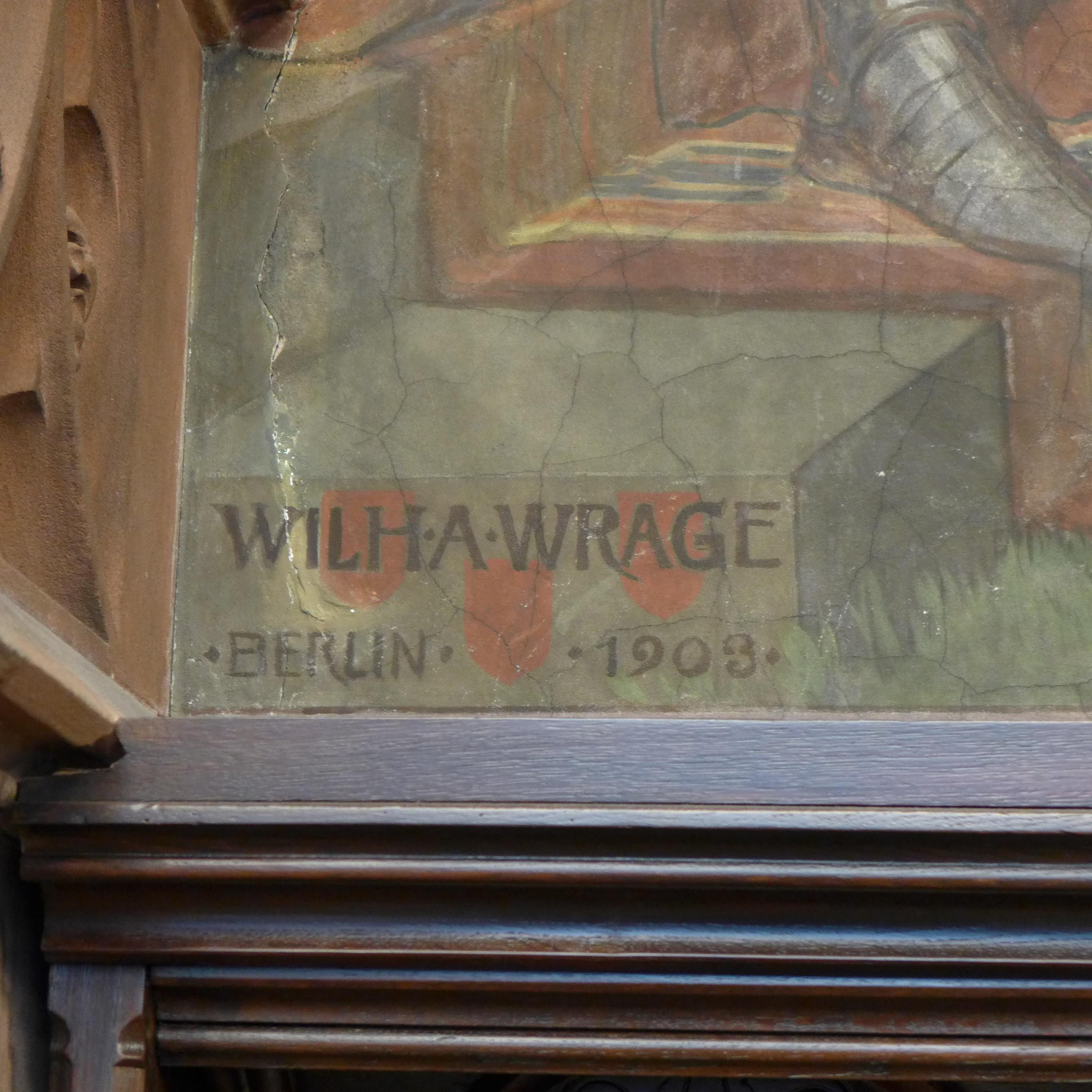 Rathaus St. Johann, Festsaal, Wandgemälde, Signatur von Wrage mit den drei Malerwappenschilden